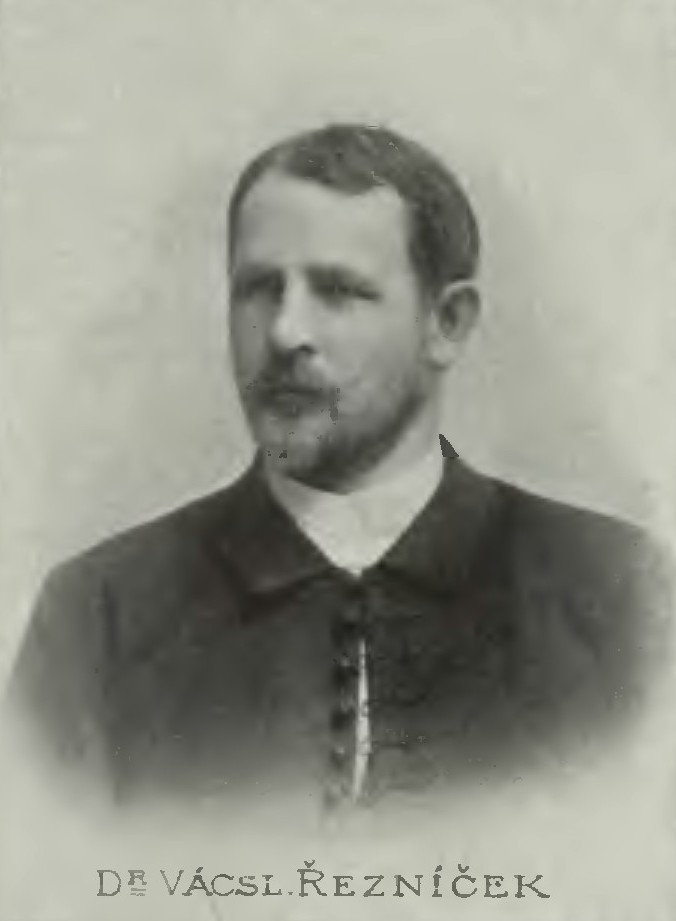 Portrét – Václav Řezníček (1861-1924), Český spisovatel a novinář.